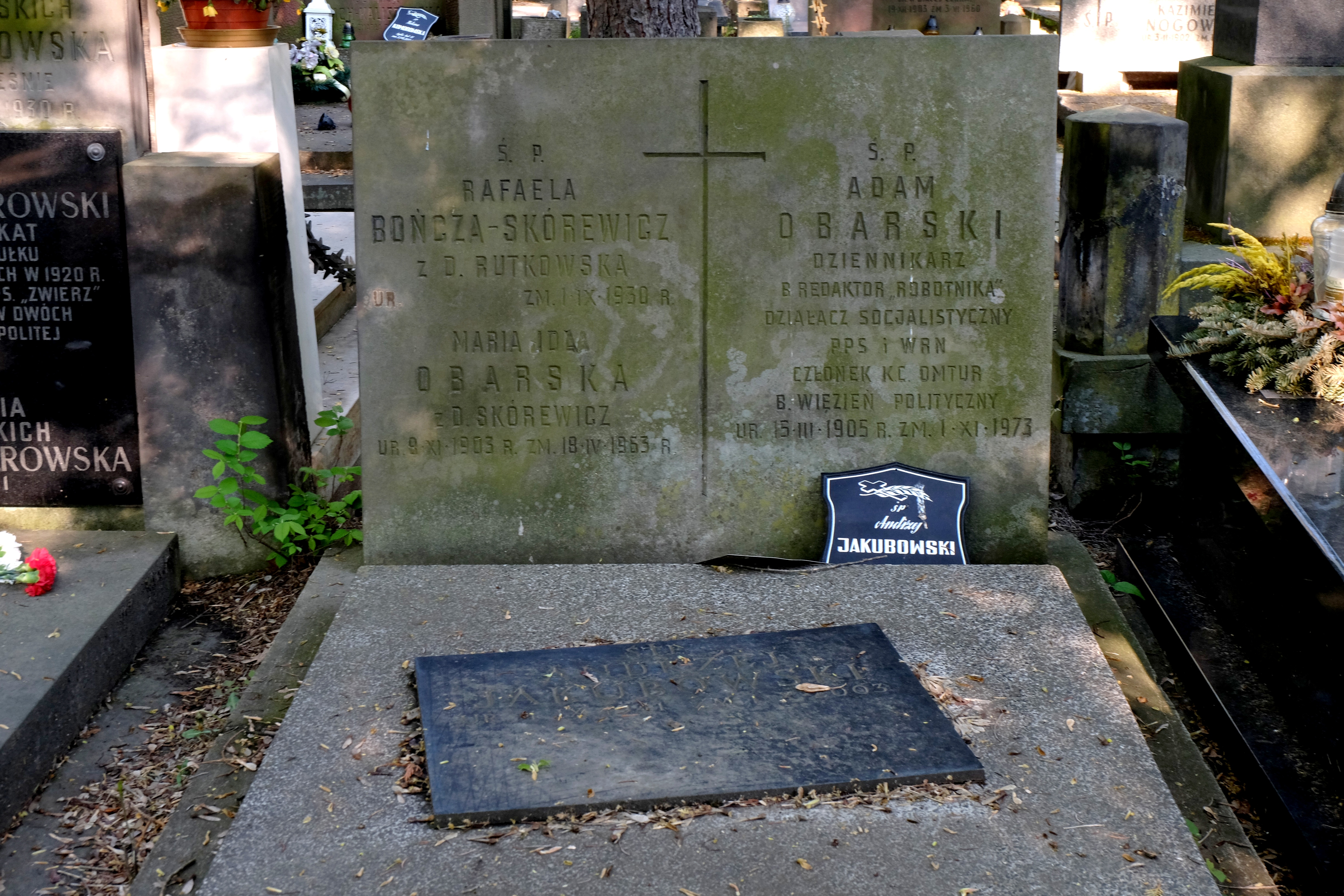 Grób działacza socjalistycznego Adama Obarskiego na Cmentarzu Powązkowskim w Warszawie